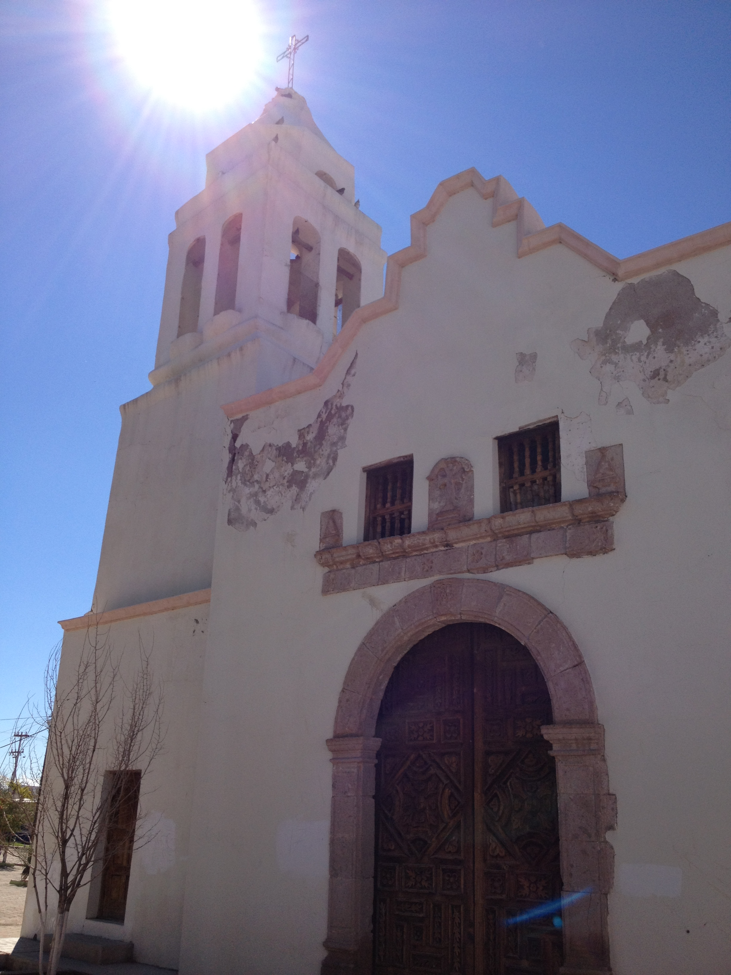 Templo de San Carlos en Aldama, Chihuahua